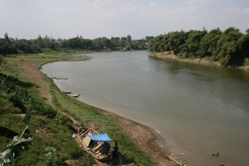 Basa Jawa: Bengawan Solo pas ngliwati Kutha Cepu